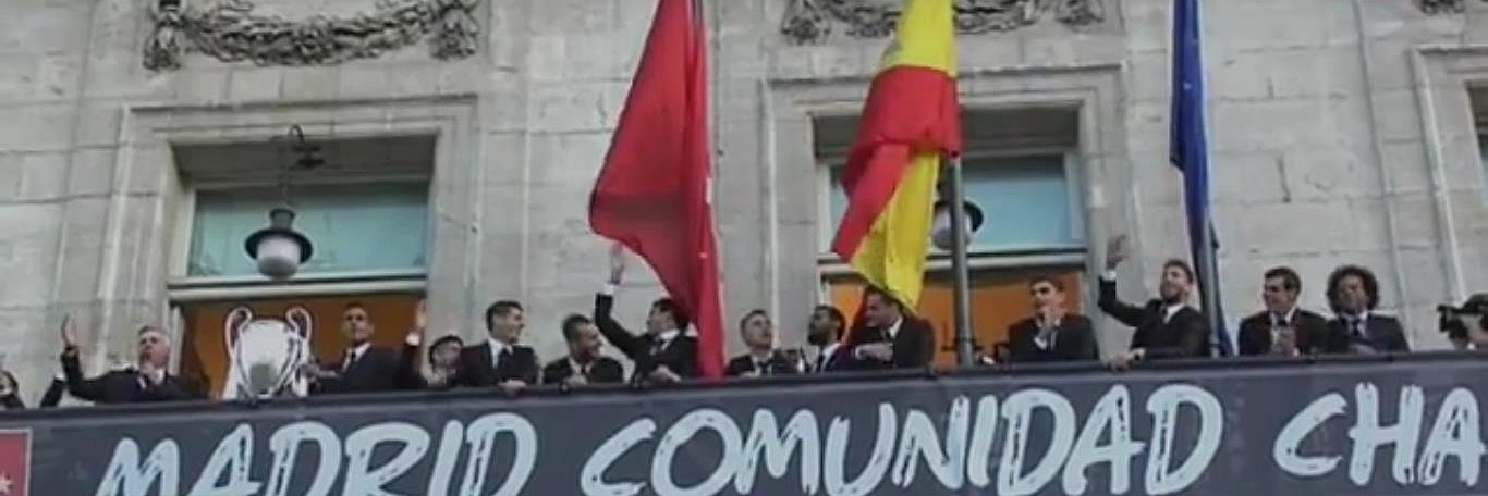 Celebración en el balcón del Palacio de la Presidencia de la Comunidad de Madrid de la conquista en el día anterior de la Décima Copa de Europa por parte del Real Madrid ante el Atlético de Madrid.